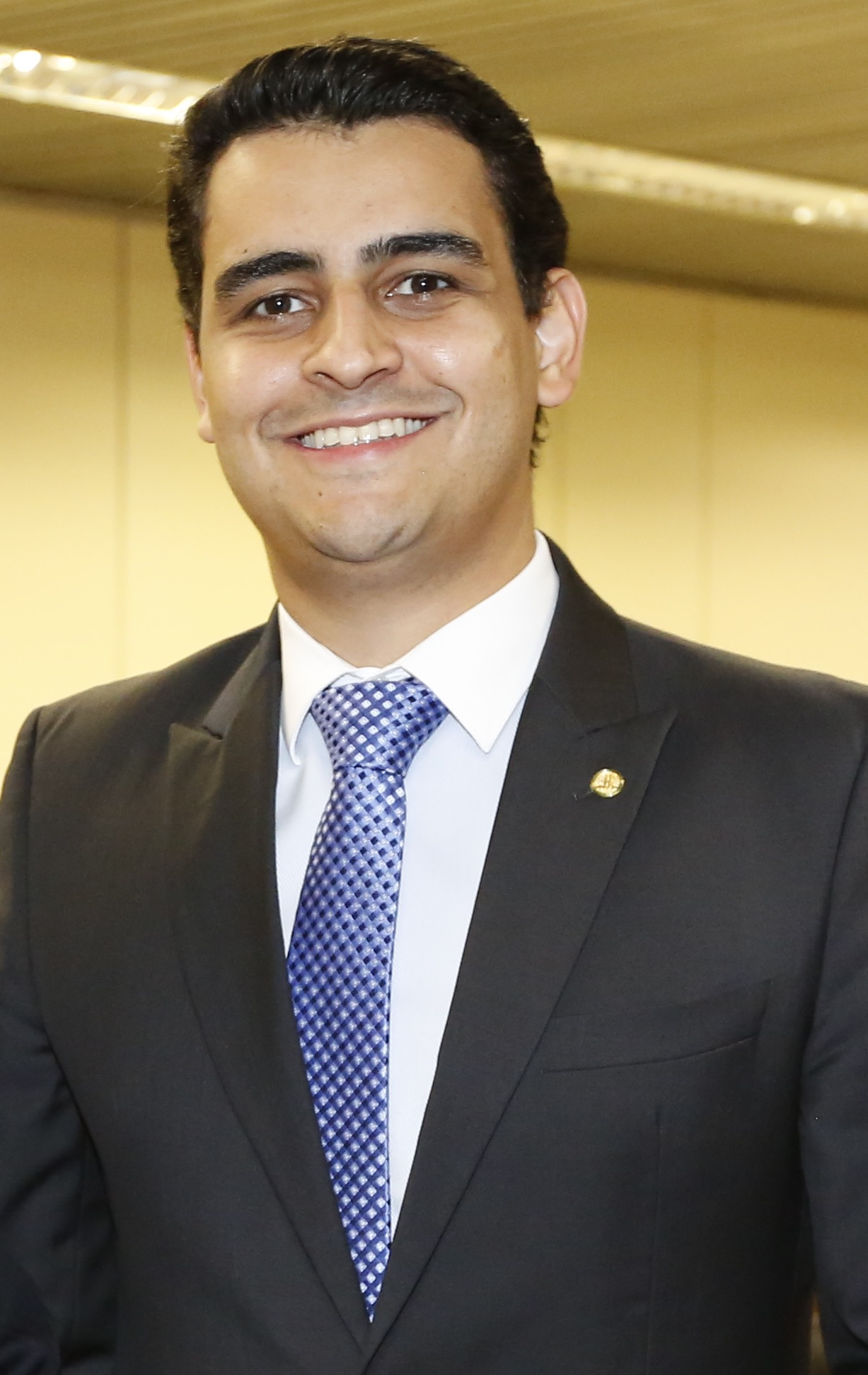 16-12-2015 Vice-presidente Michel Temer recebe o deputado federal João Henrique Caldas (JHC) PSB/AL. - Foto: Anderson Riedel